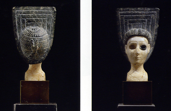 Голова жрицы или богини, Возможно богиня Нана, мрамор и хлорит, Бактрийско-Маргианская культура, около 2000-1750 годов до н.э.